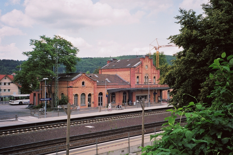 Bahnhof Hann. Münden während des Umbaus 2007, Gleisseite